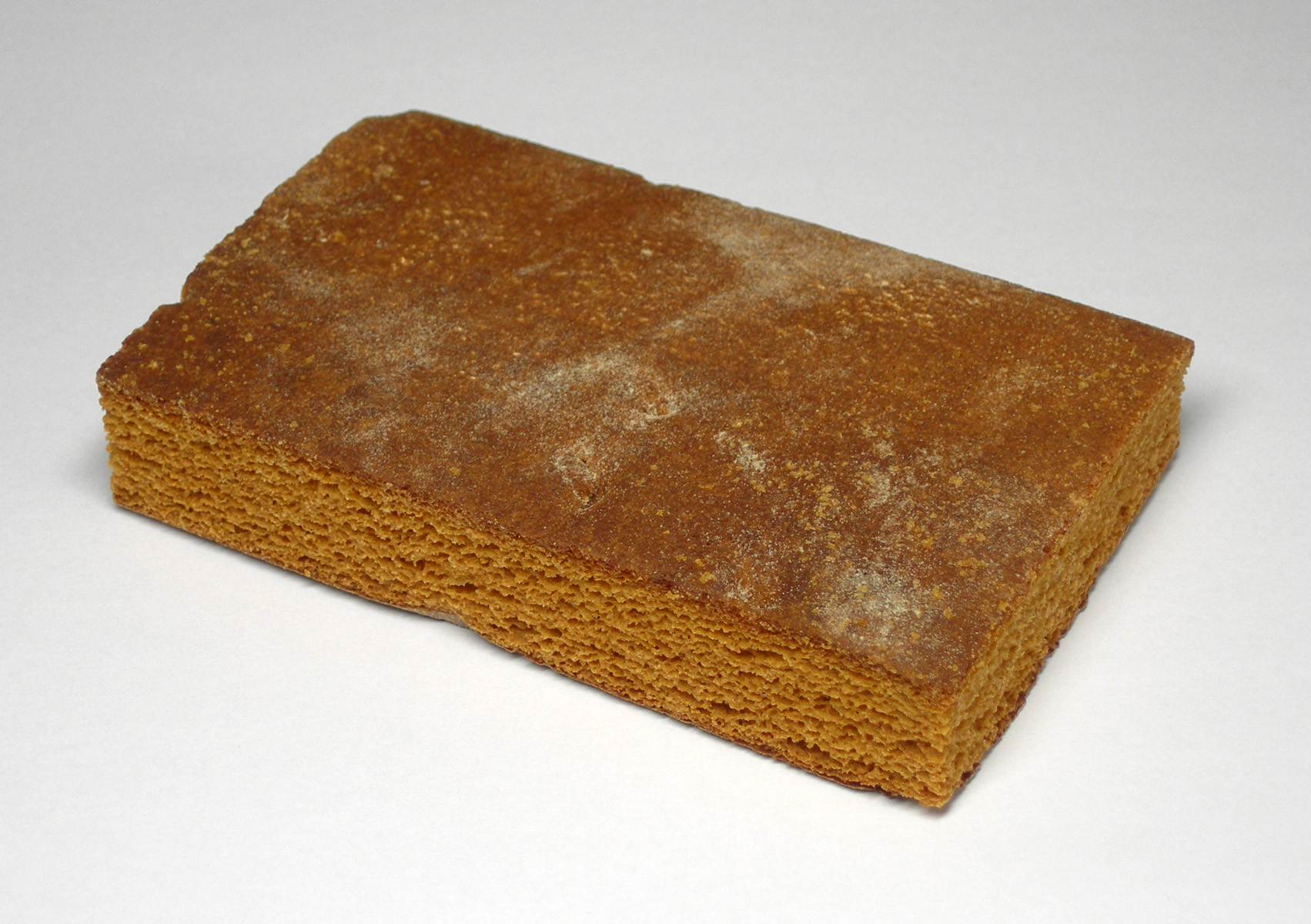 German Soßenkuchen, a kind of gingerbread for binding sauces